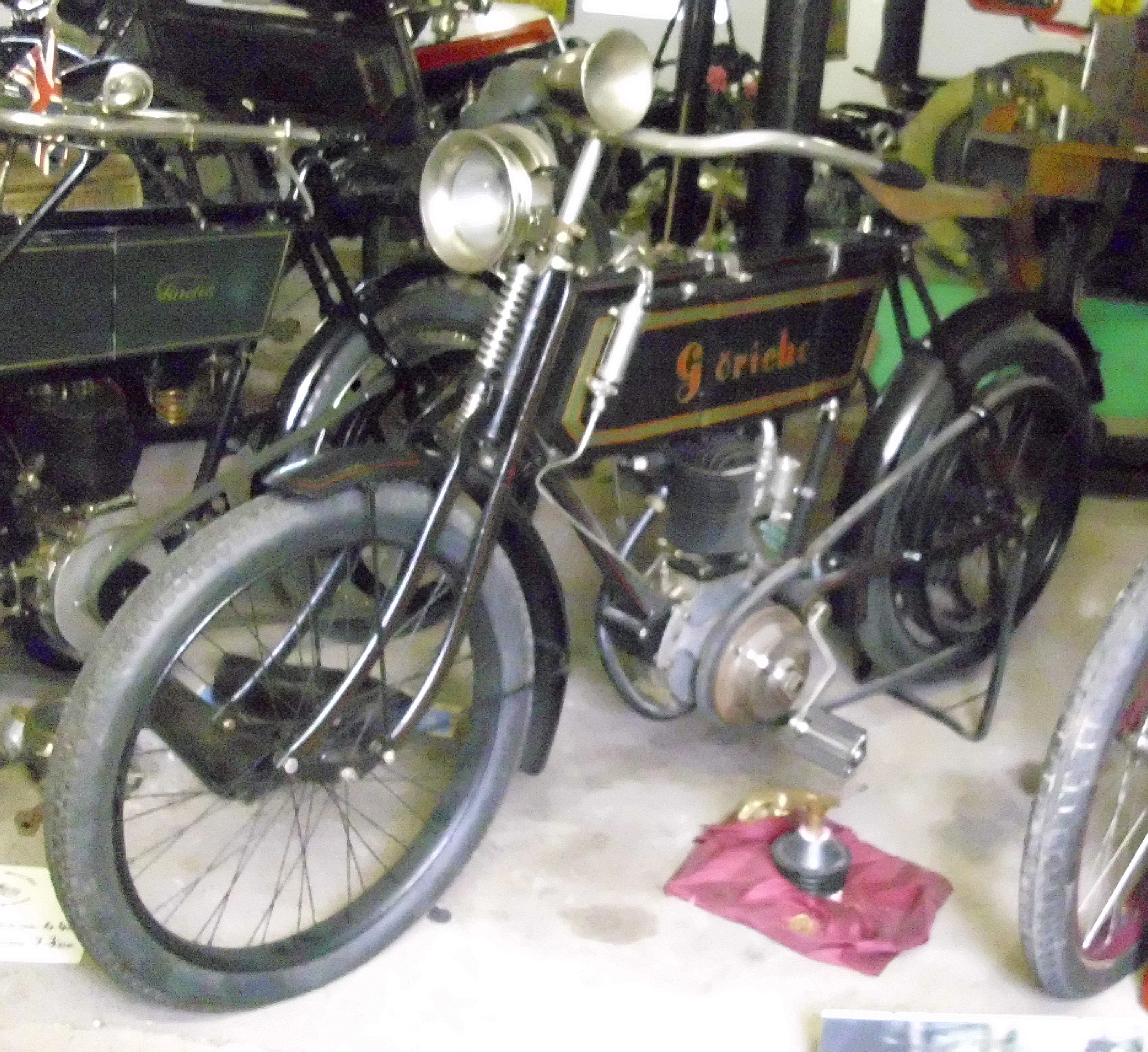 Göricke Motorrad